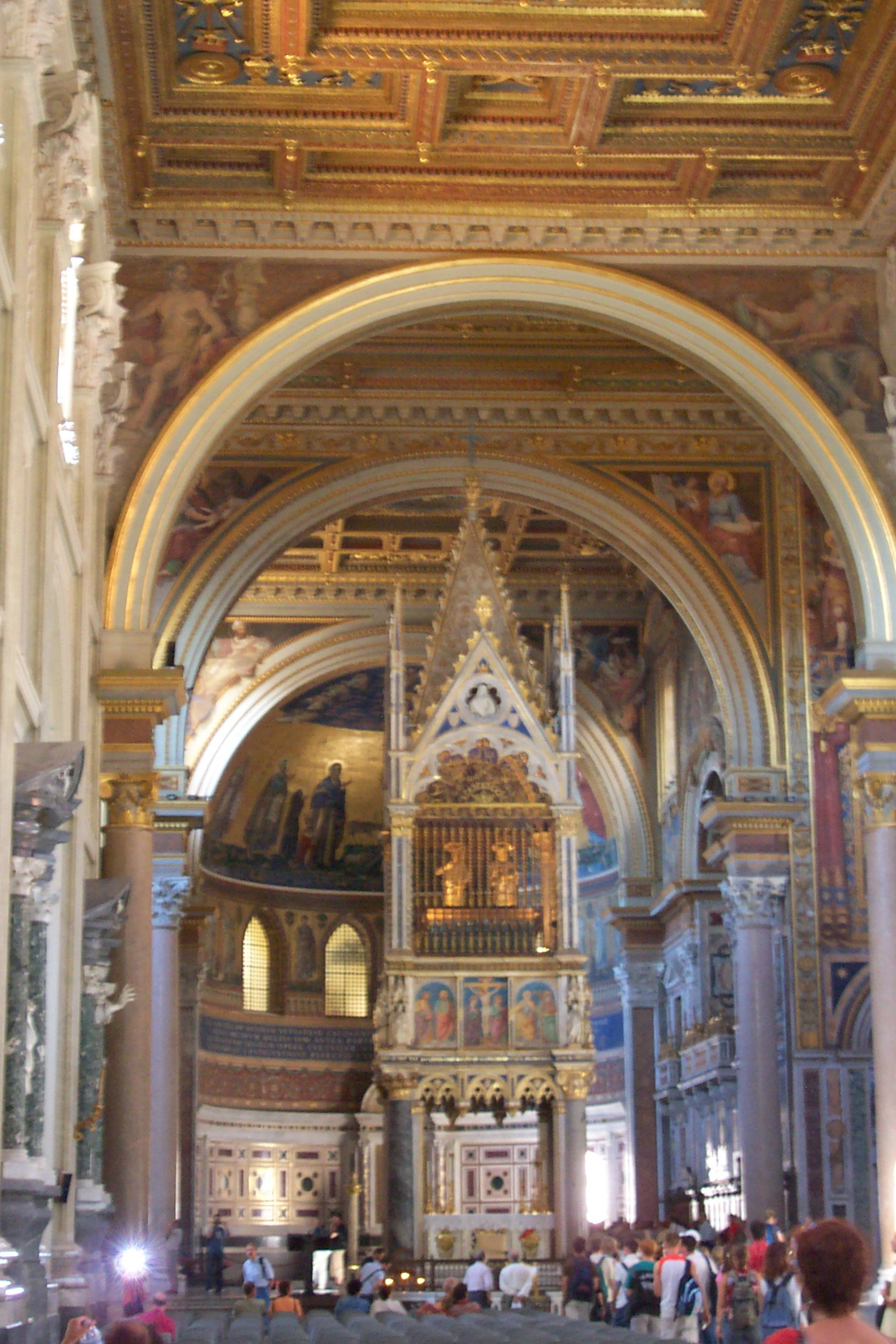 Basilica di San Giovanni in Laterano, Roma, Italy